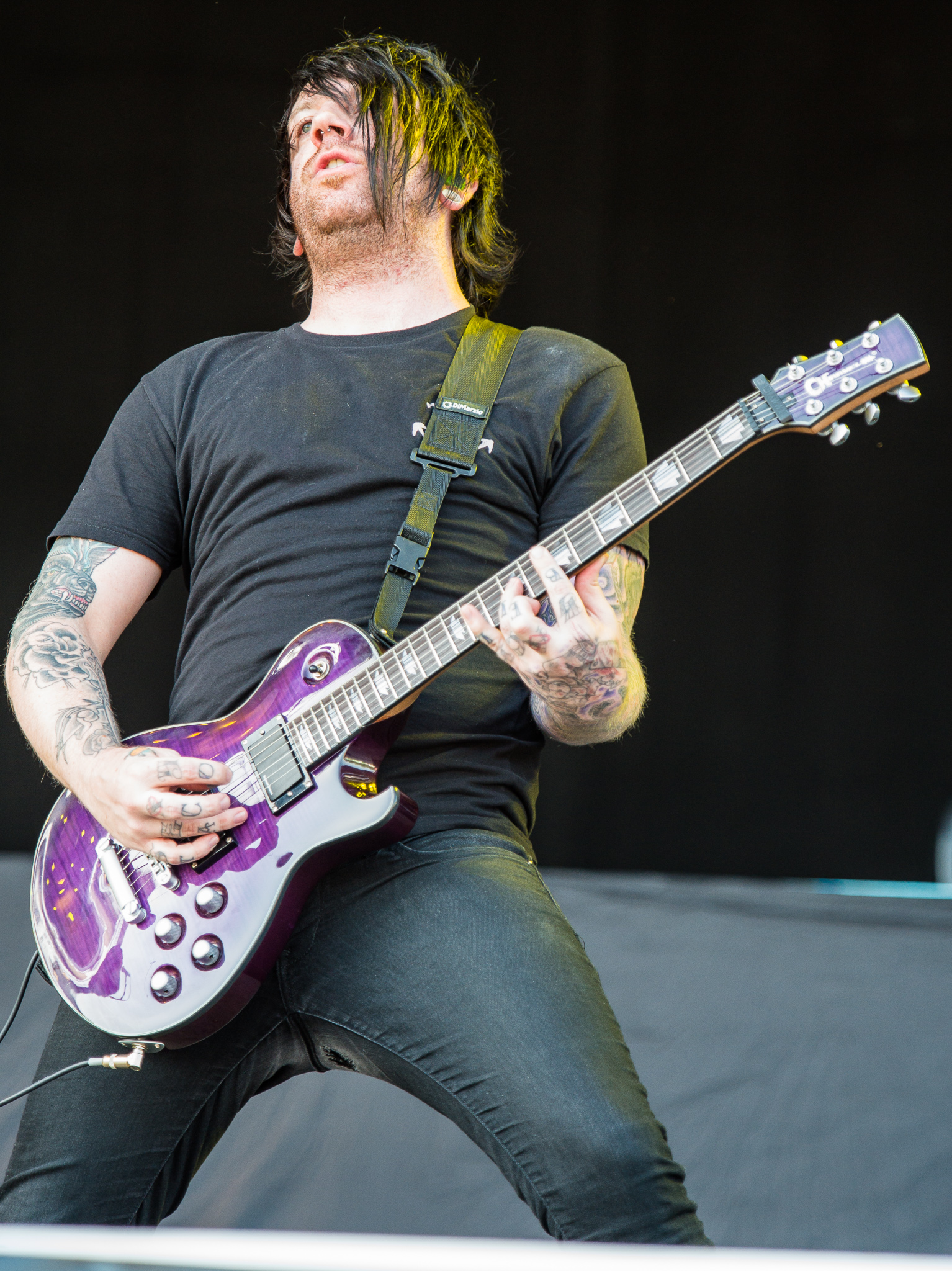 ARGO-Konzerte,Centerstage,Derek Jones,Falling in Reverse,Konzert,Livekonzert,Livemusik,Musik,RiP,Rock im Park 2014